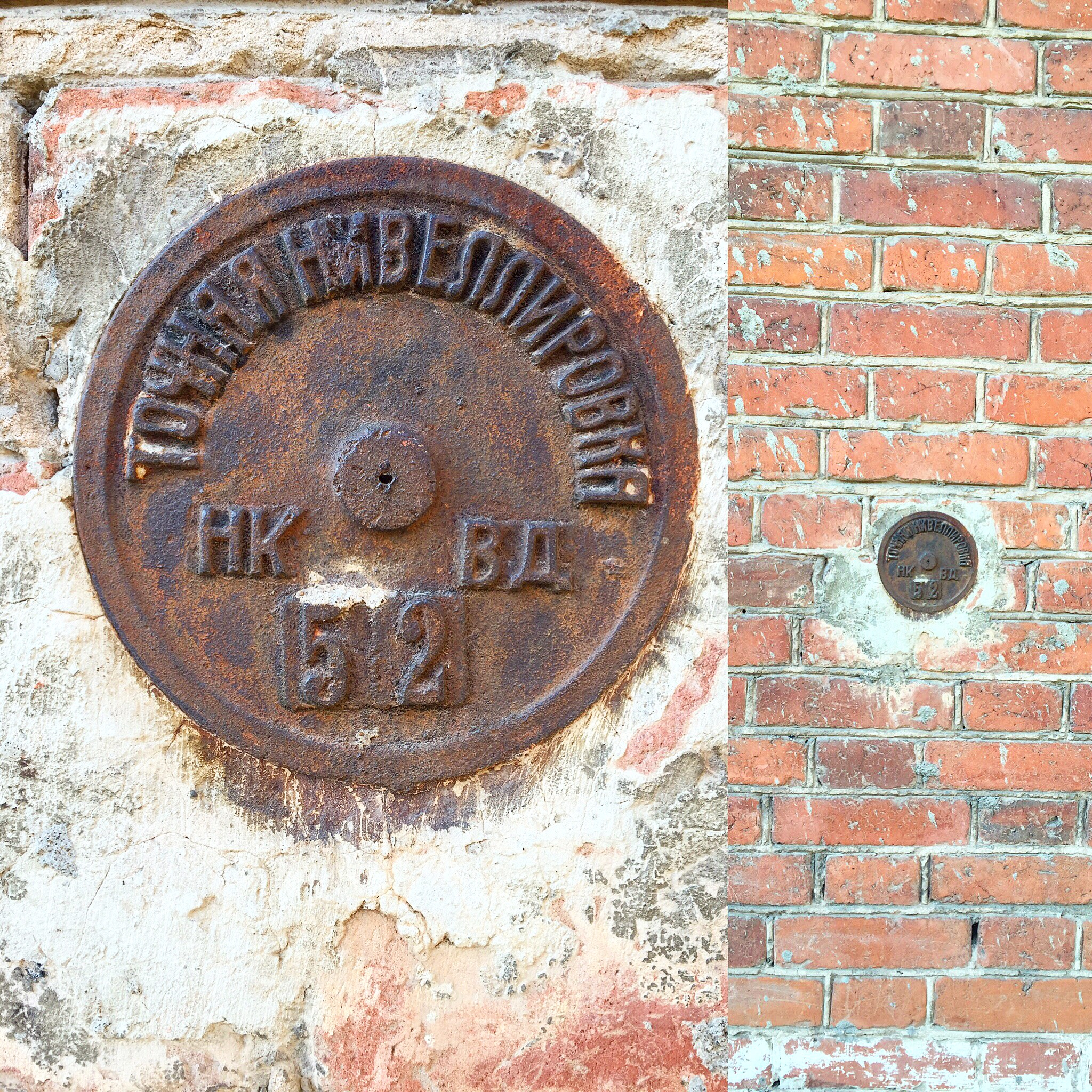 Нивелирная марка на здании ул. Телегина, 30 в Ижевске (слева увеличенное изображение)